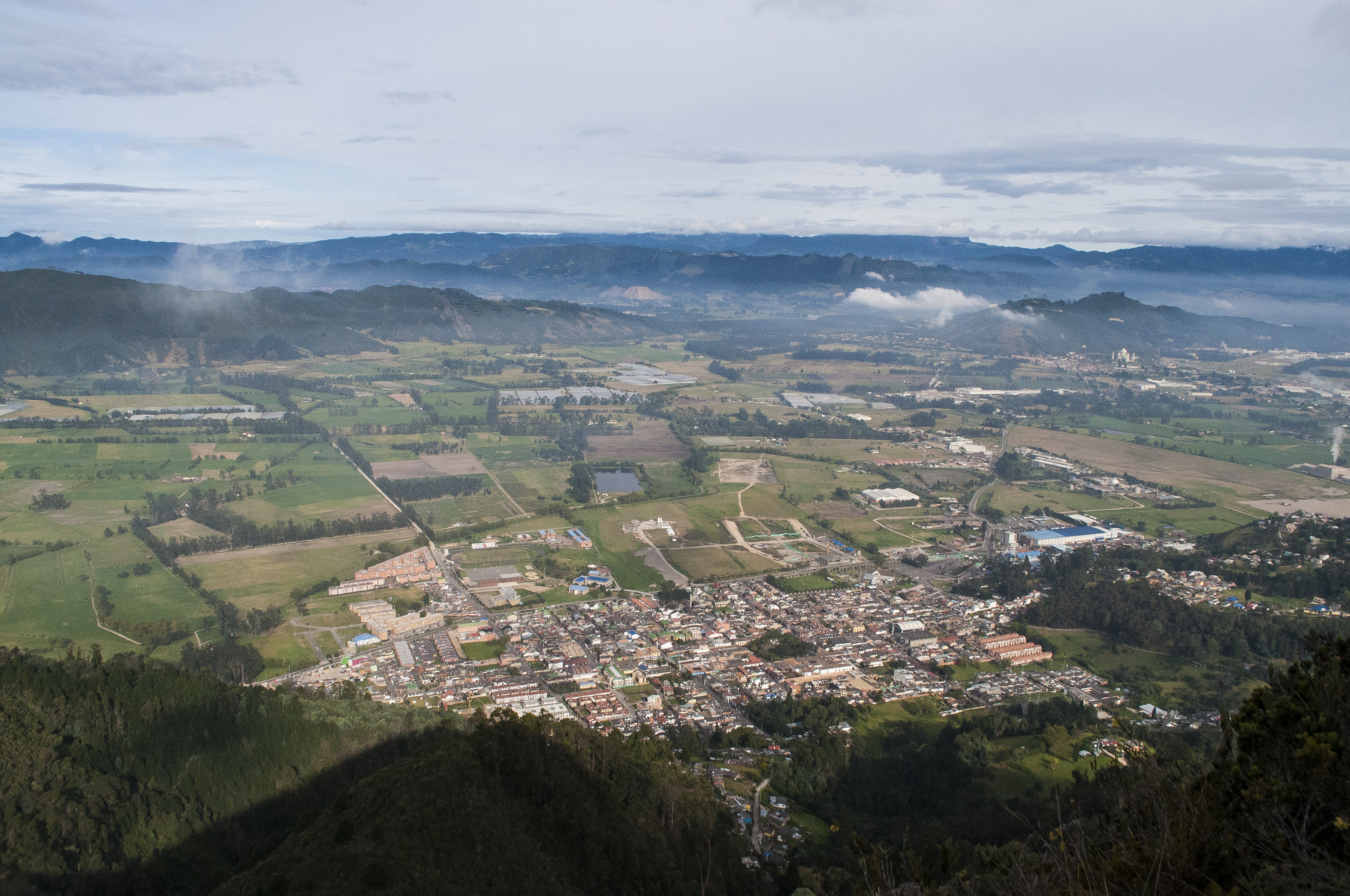 Valle de Sopó